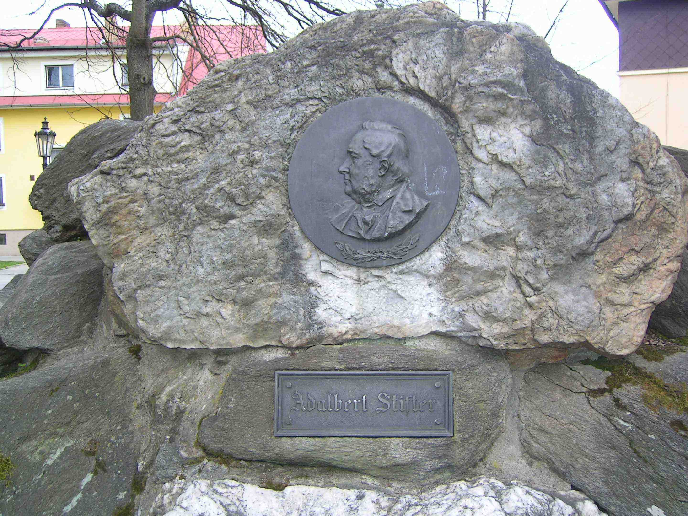 Bronzeplatte auf einem Felsblock in Frymburk in der Tschechei, welche an Adalbert Stifter erinnert. sculptor: Johann Rathausky (1858–1912) Alternative names Hans RathauskyDescriptionAustrian sculptorDate of birth/death 24 November 1858 16 July 1912Location of birth/death Vienna ViennaAuthority control : Q1682723 VIAF: 272113132 ISNI: 0000 0003 8385 0299 GND: 1027435025 creator QS:P170,Q1682723